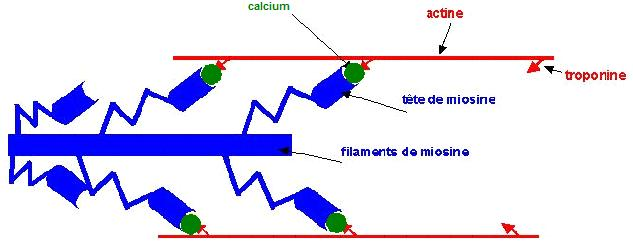 Schéma du cross-bridge